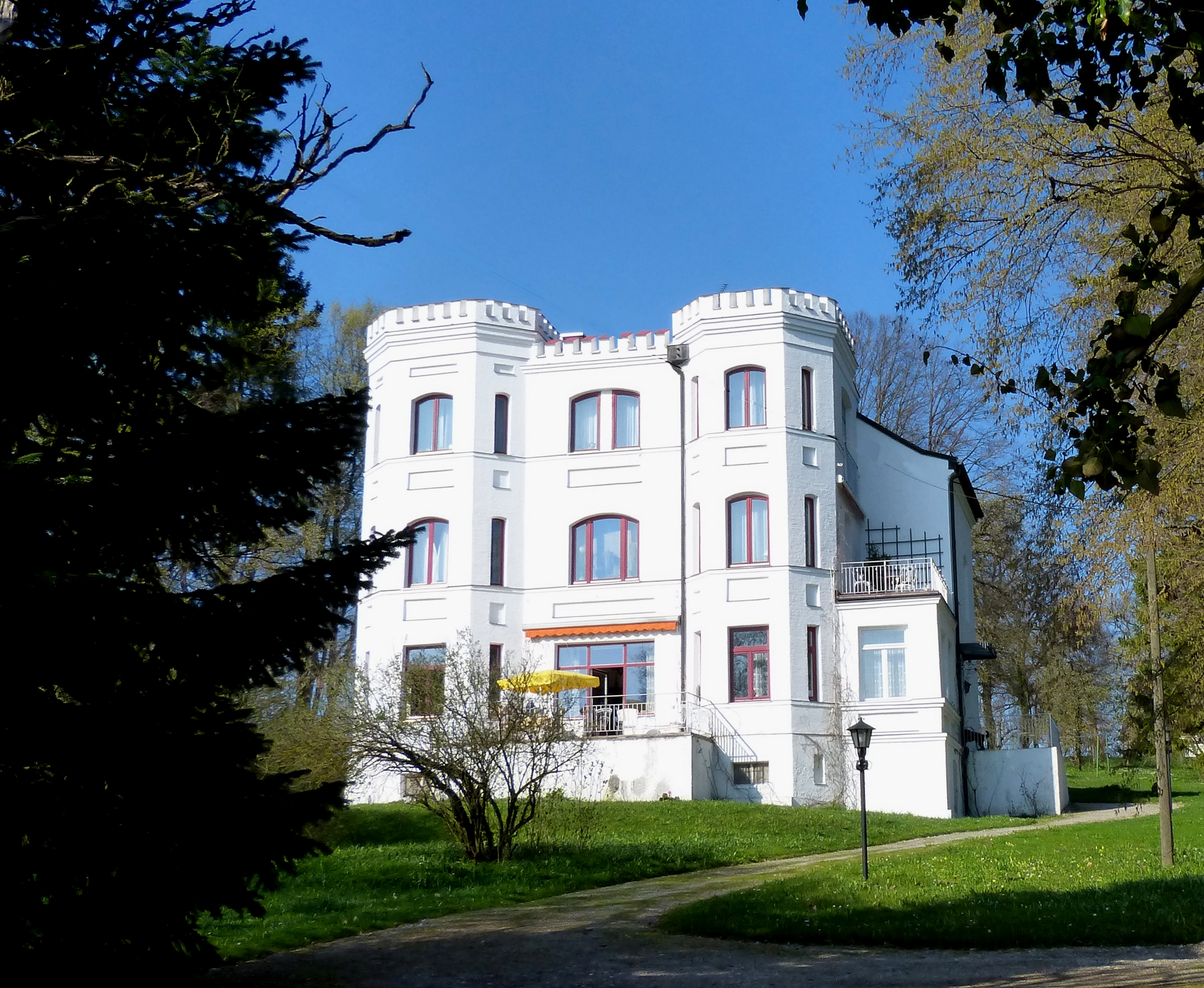 Gilching, Leitenweg 21. Die Villa Rosenburg, ein dreigeschossiger Bau mit zwei zinnenbekrönten Eckerkertürmen und Segmentbogenfenstern, wurde am Ende des 19. Jahrhunderts erbaut. This is a photograph of an architectural monument.